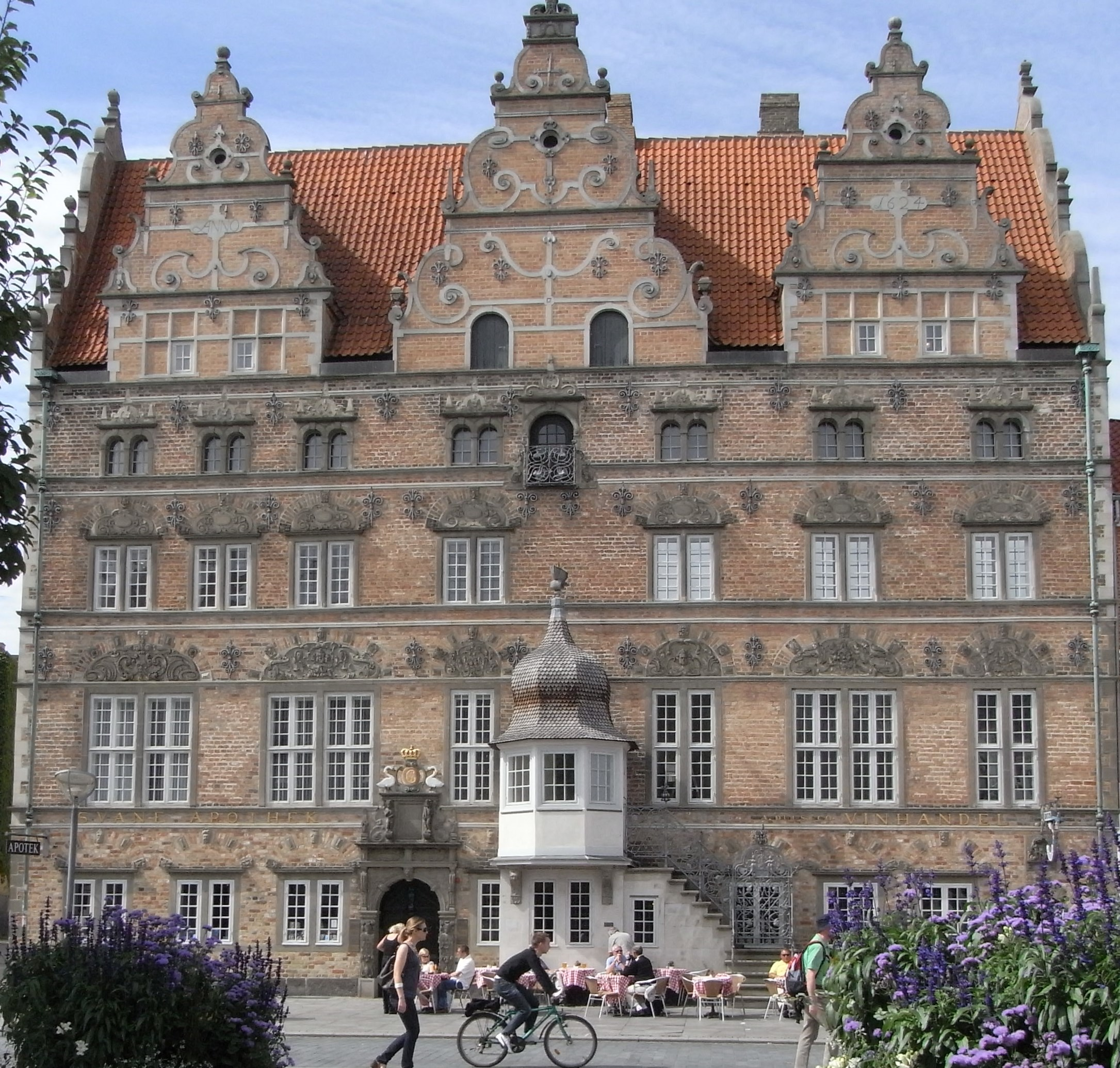 Jens Bangs Stenhus, historisches Gebäude in Aalborg, Dänemark